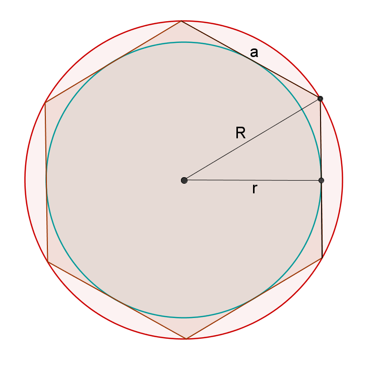 файл создан в среде GeoGebra